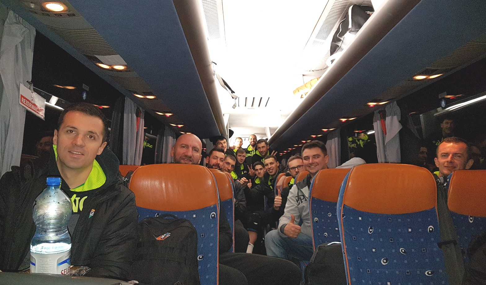 Stelmet Enea BC Zielona Góra po meczu ze Spójnią Stargard (16.12.2018)